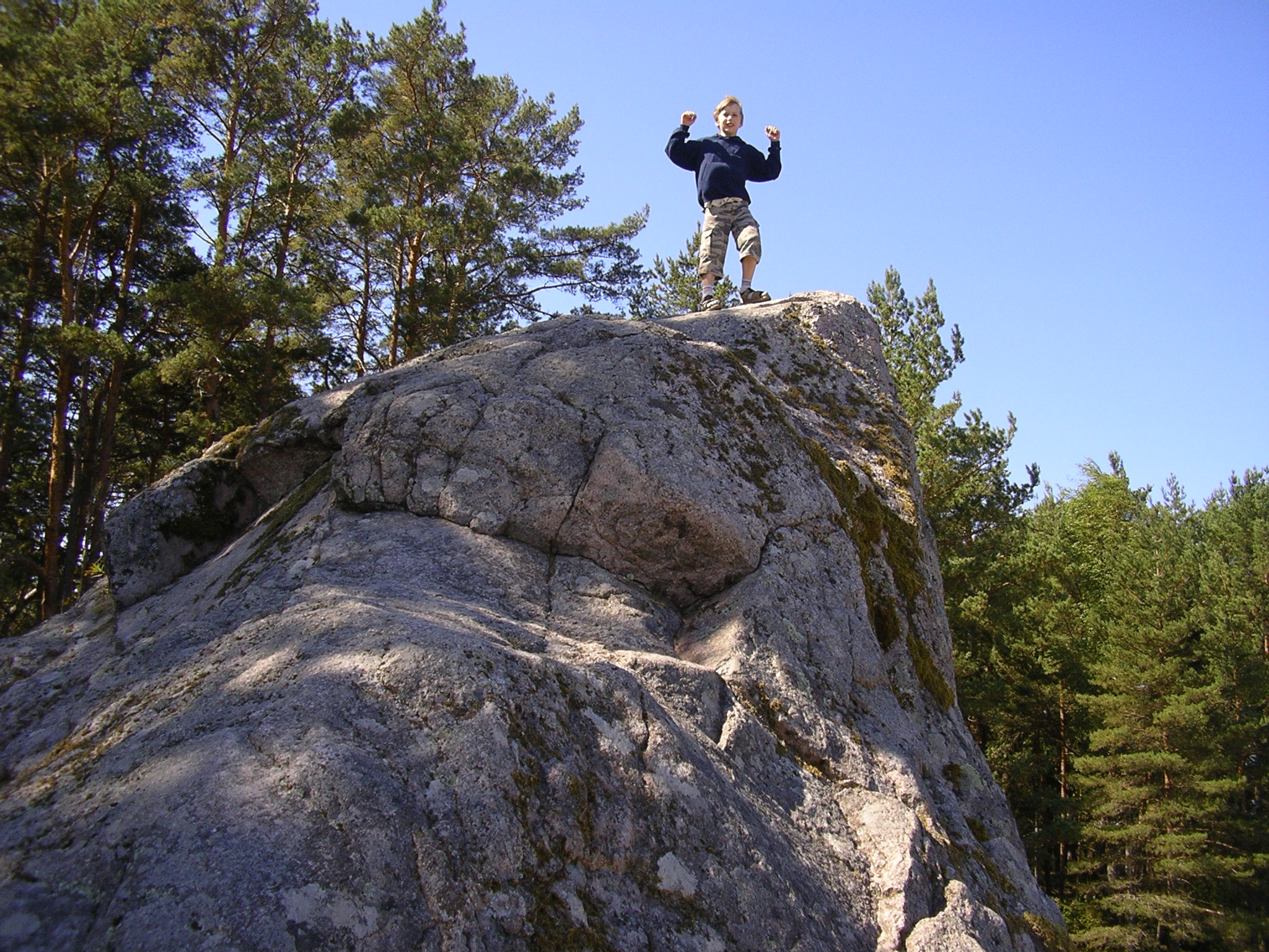 Kaarnakivi